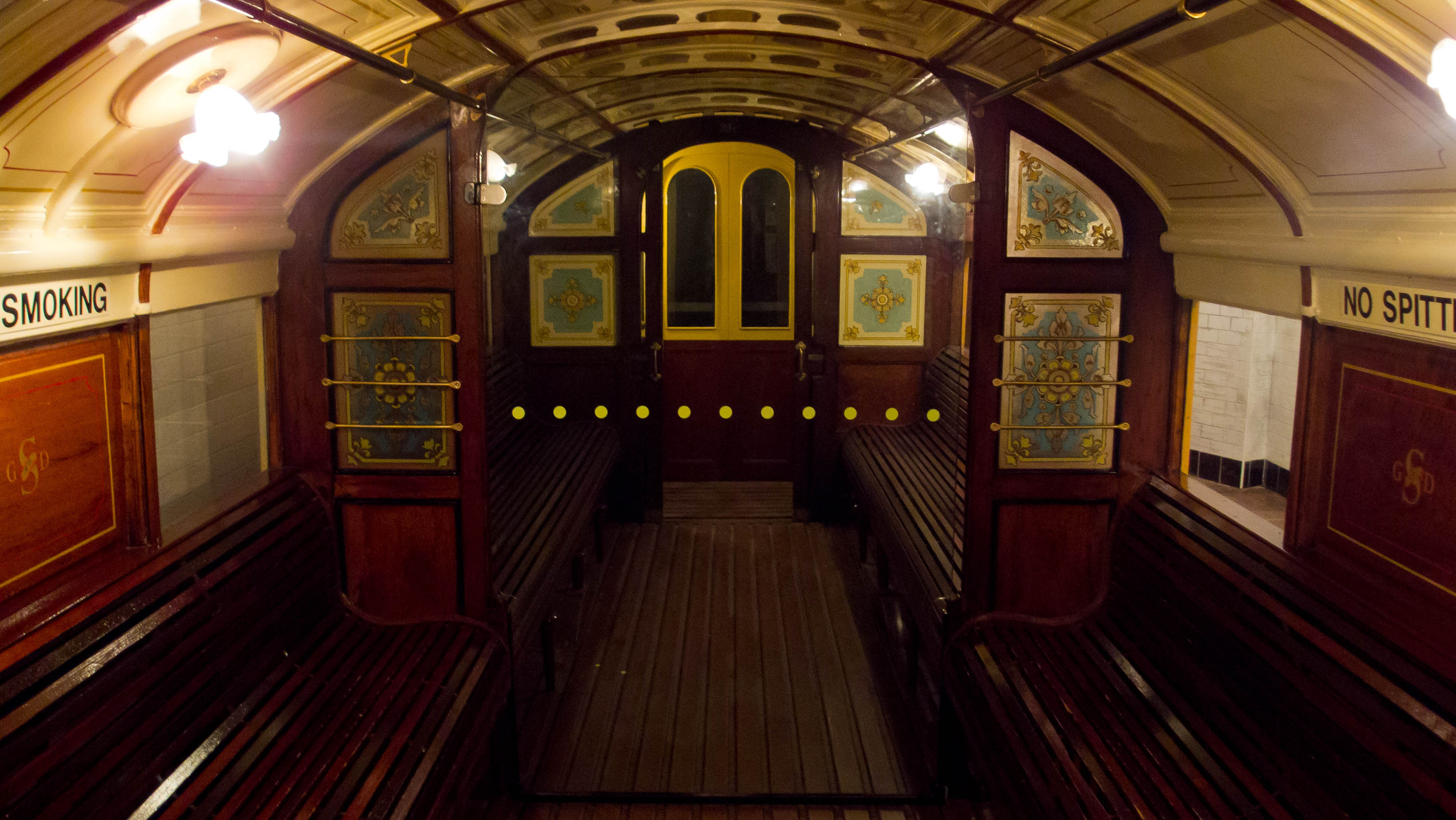 Riverside Museum, Glasgow